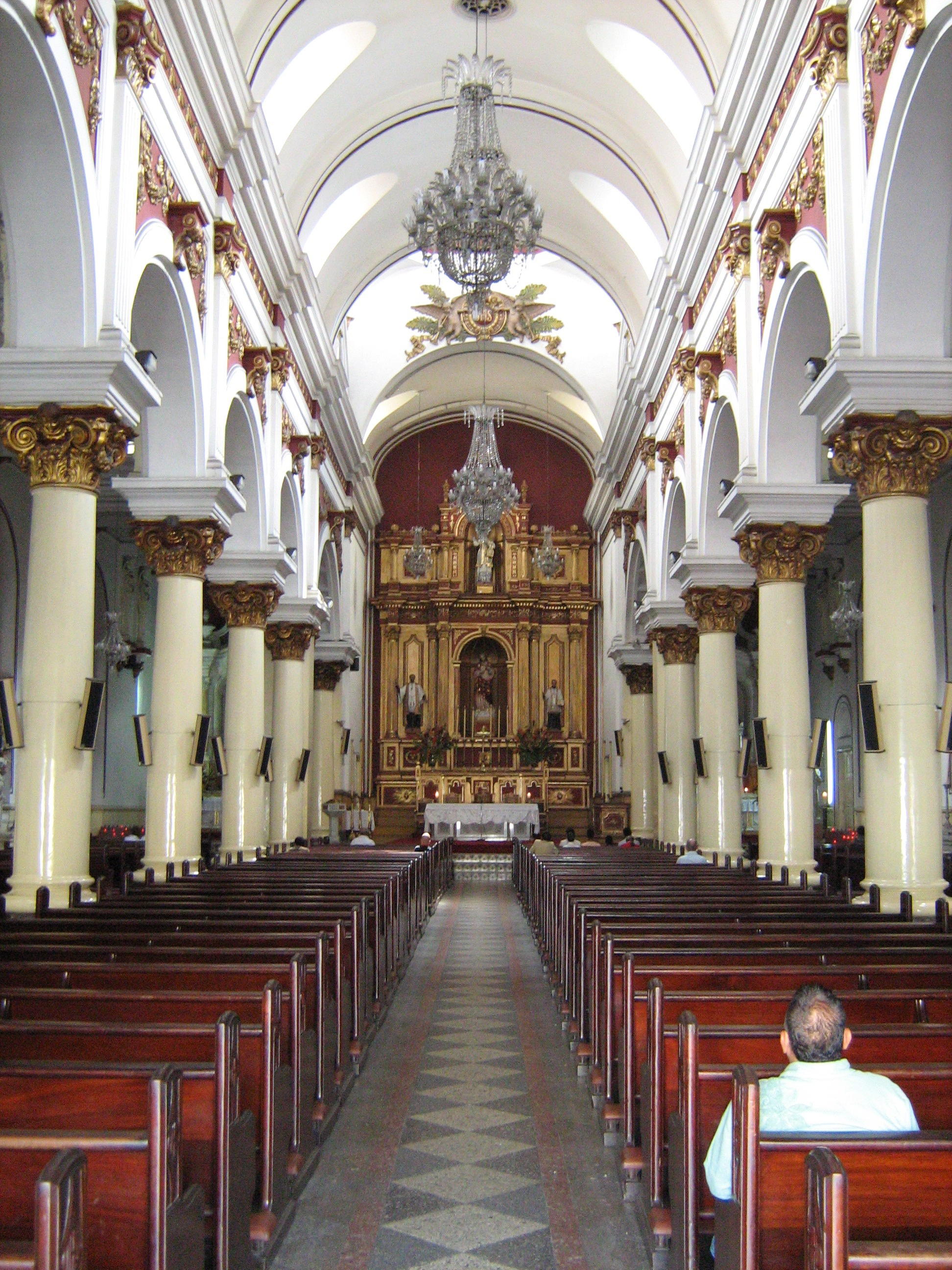 Iglesia de San Ignacio, Medellín. Colombia.